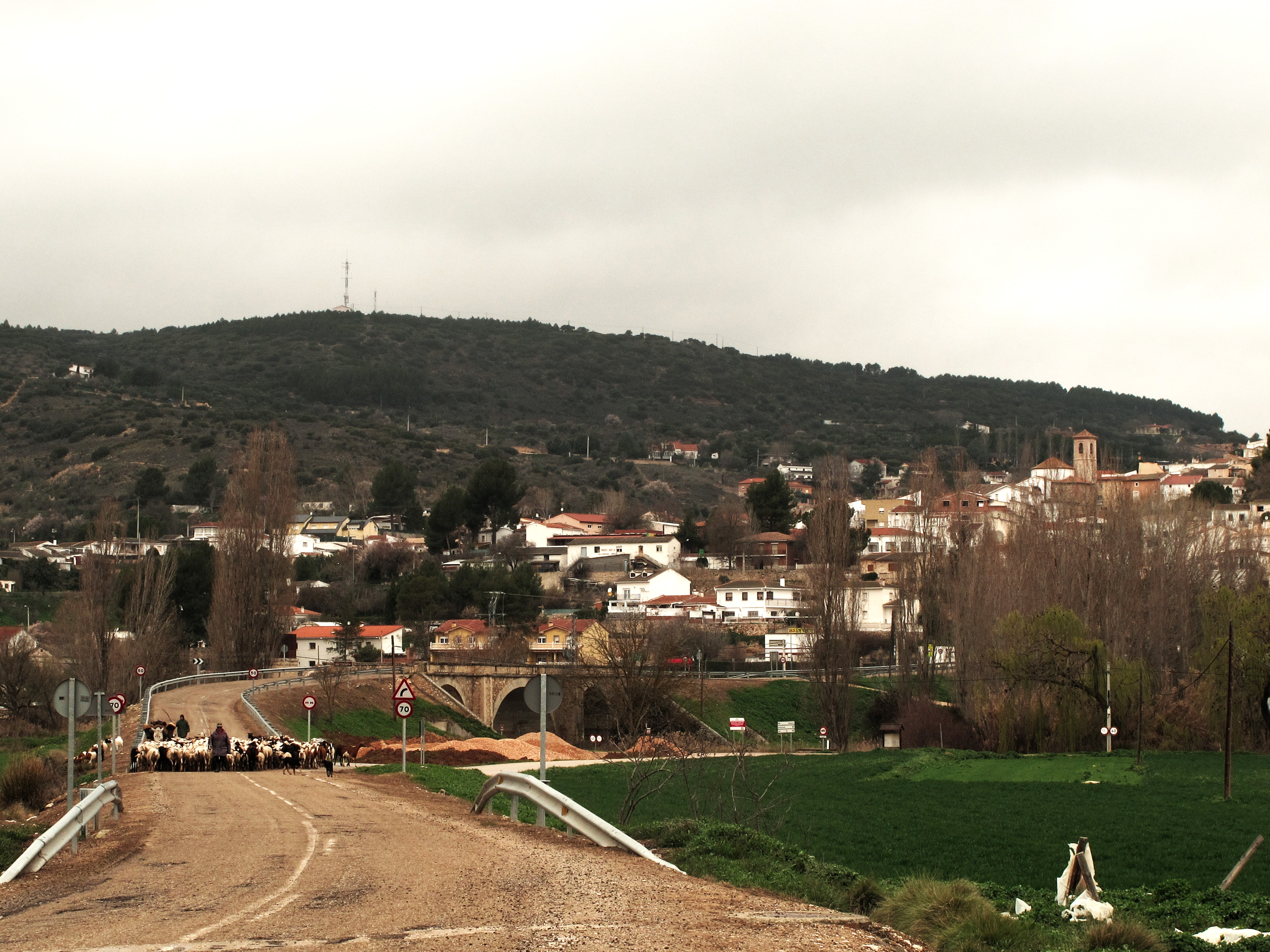 Denominado Orusco hasta 1991, situado en la vega del rioTajuña. Destaca la iglesia San Juan Evangelista, del siglo XVII